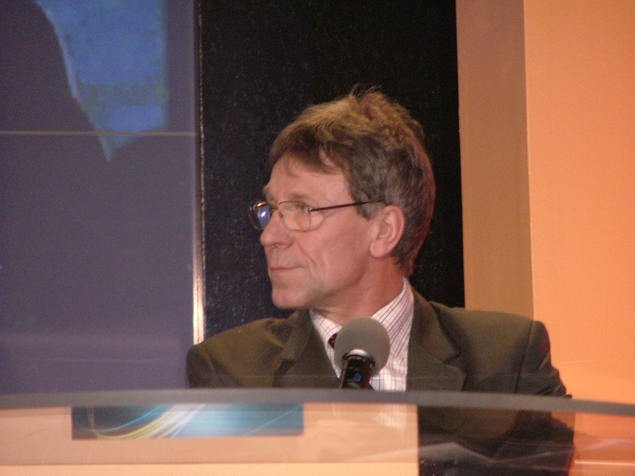 Impreza z okazji 1. urodzin TVP Sport, Warszawa, Centrum Olimpijskie